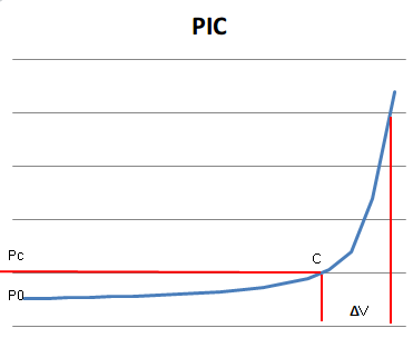 Curva que muestra la variación de la presión intracraneal en función del volumen añadido al cráneo. Donde: ΔV es la adición del volumen C es el punto crítico. (Donde los mecanismos reguladores se pierden) Pc es la presión crítica P0 es la presión normal La gráfica es representativa pero no es exacta.